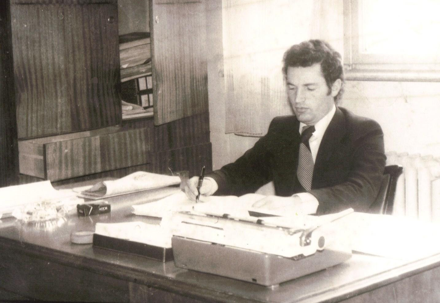 Musa Hoti dans son bureau.